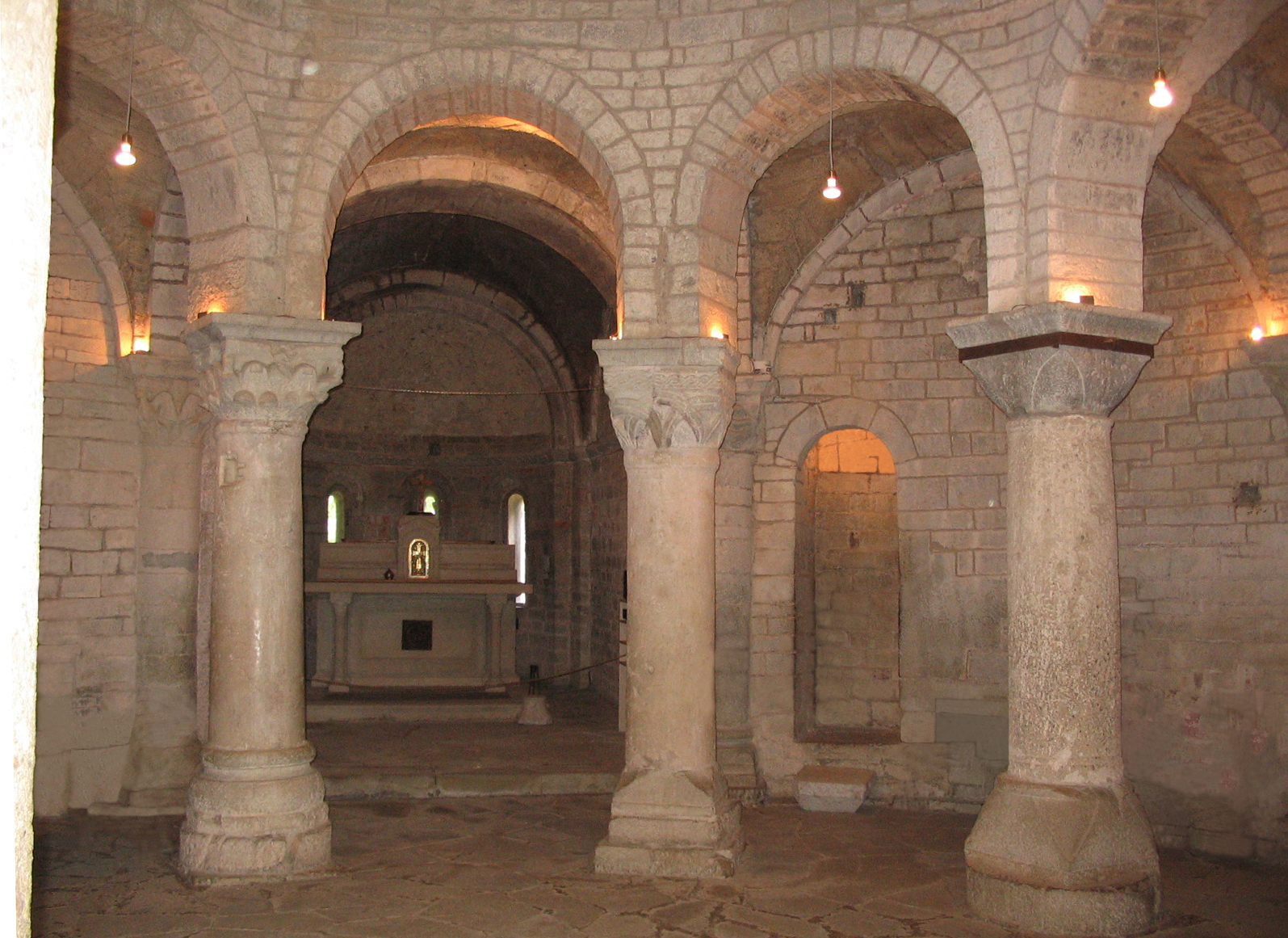 Autore Giorces. San Tomè, interno piano terra, vista su abside.